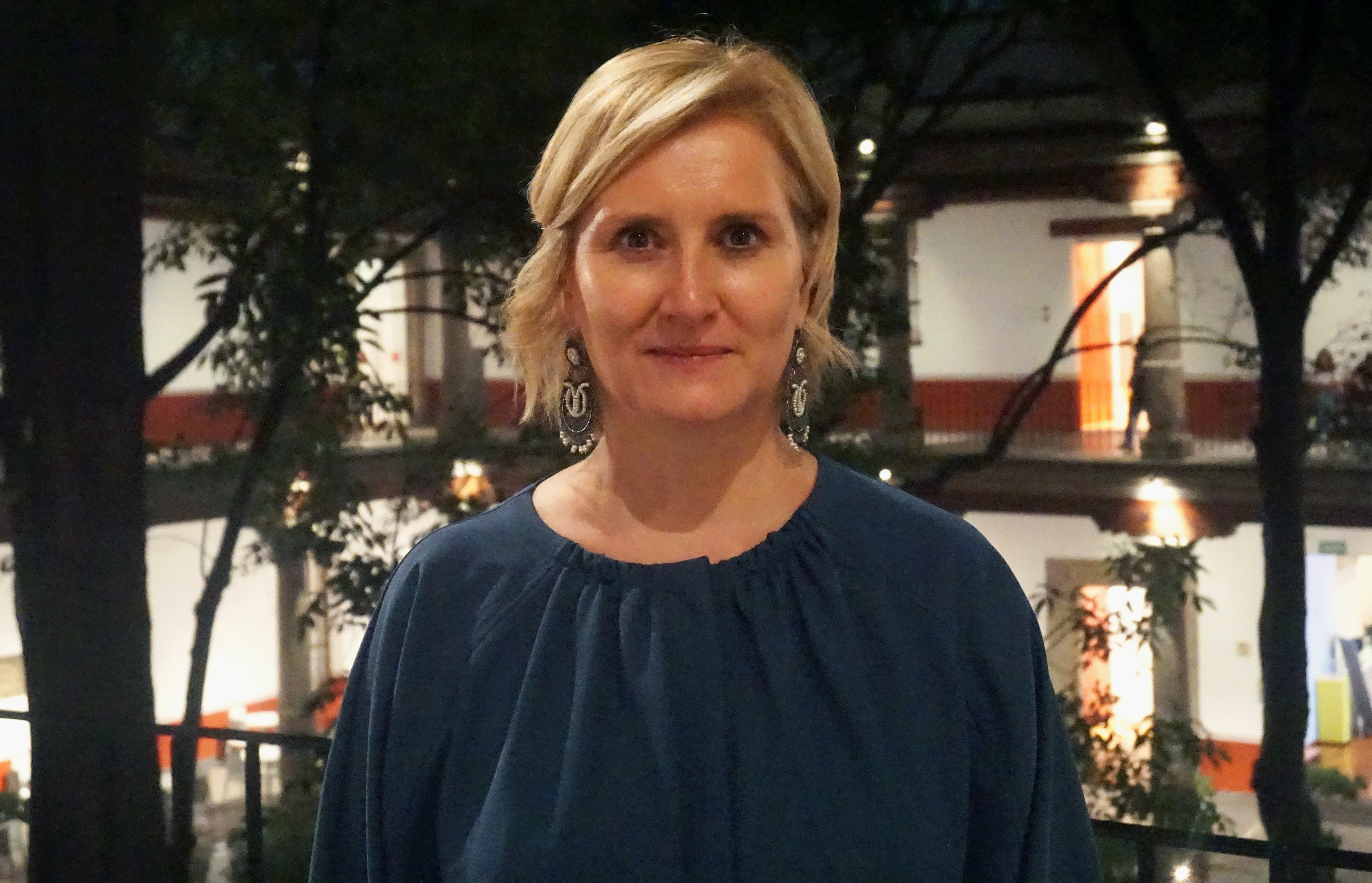 La curadora mexicana Ana Elena Mallet en la inauguración de la exposición Entre la moda y la tradición: Colección Madame Rostan.